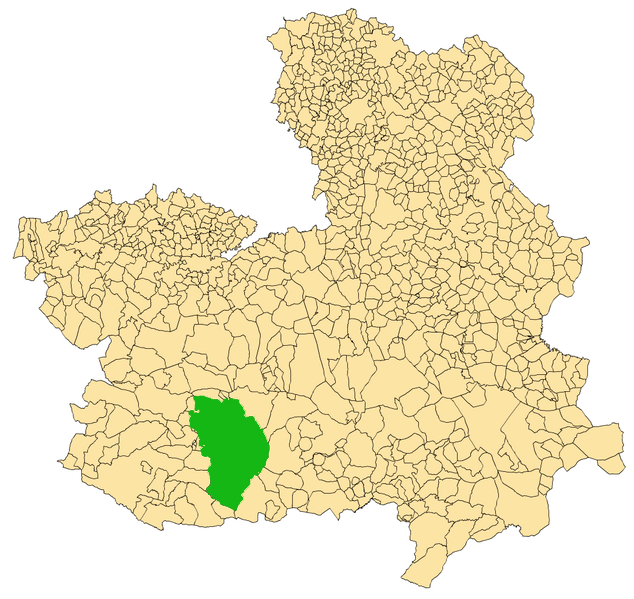 Ubicación del Campo de Calatrava en Castilla La Mancha